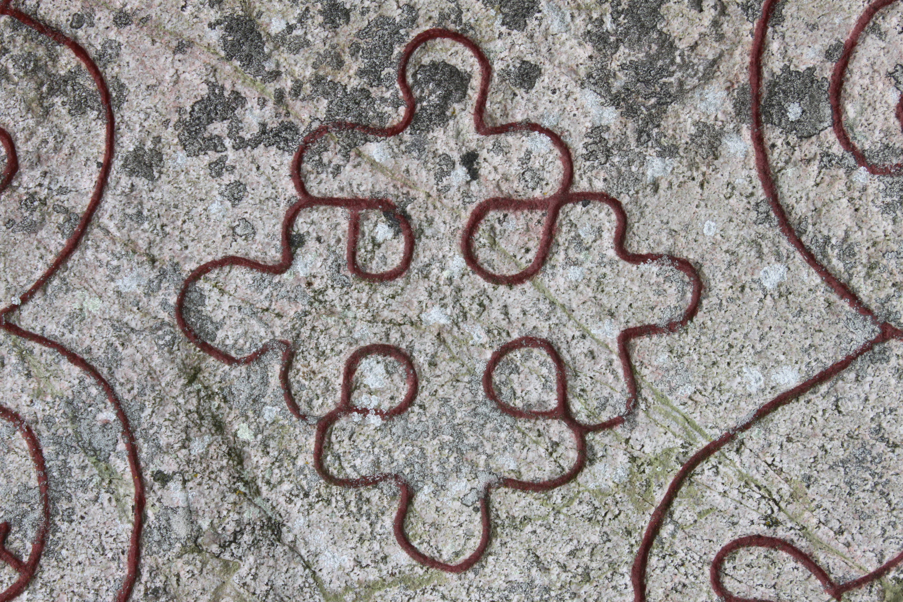 Täby 2:1. Runristning. Fast fornlämning. Detalj.